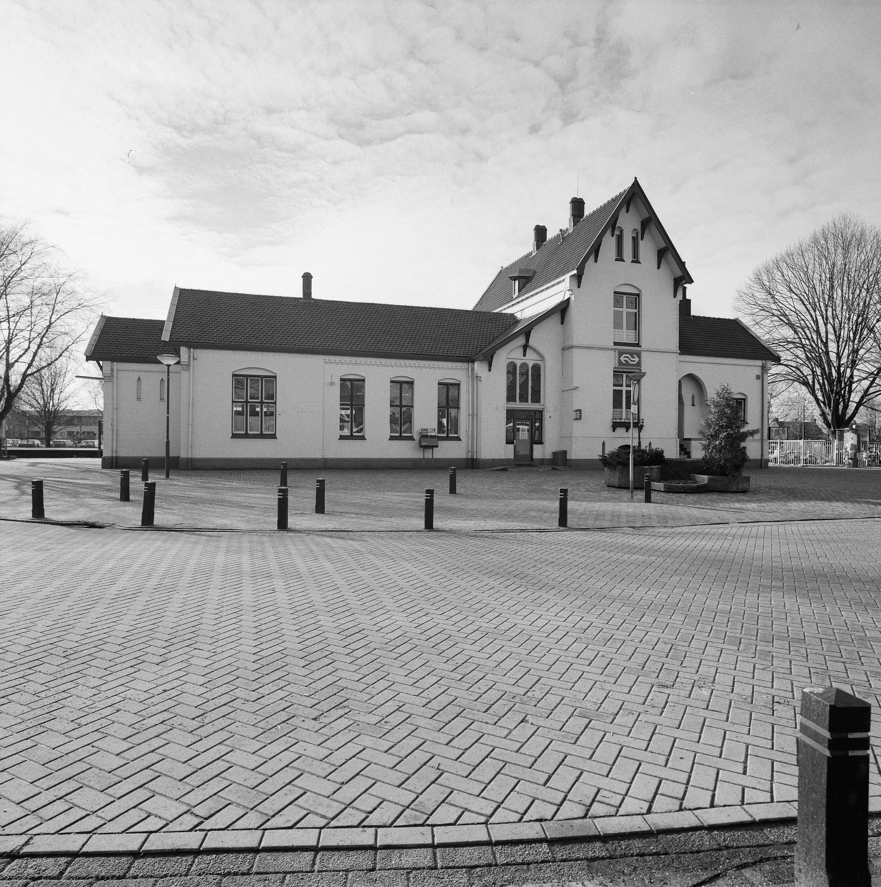 Station: Overzicht voorgevel station (opmerking: Gefotografeerd voor Monumenten In Nederland Noord-Brabant)